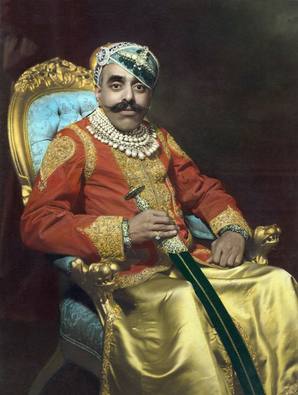 Maharana Bhupal Singh